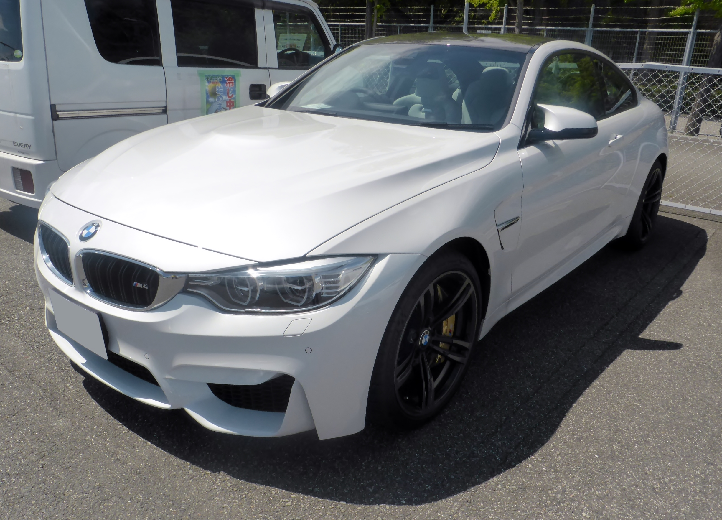 F82型BMW・M4クーペをフロントから撮影。